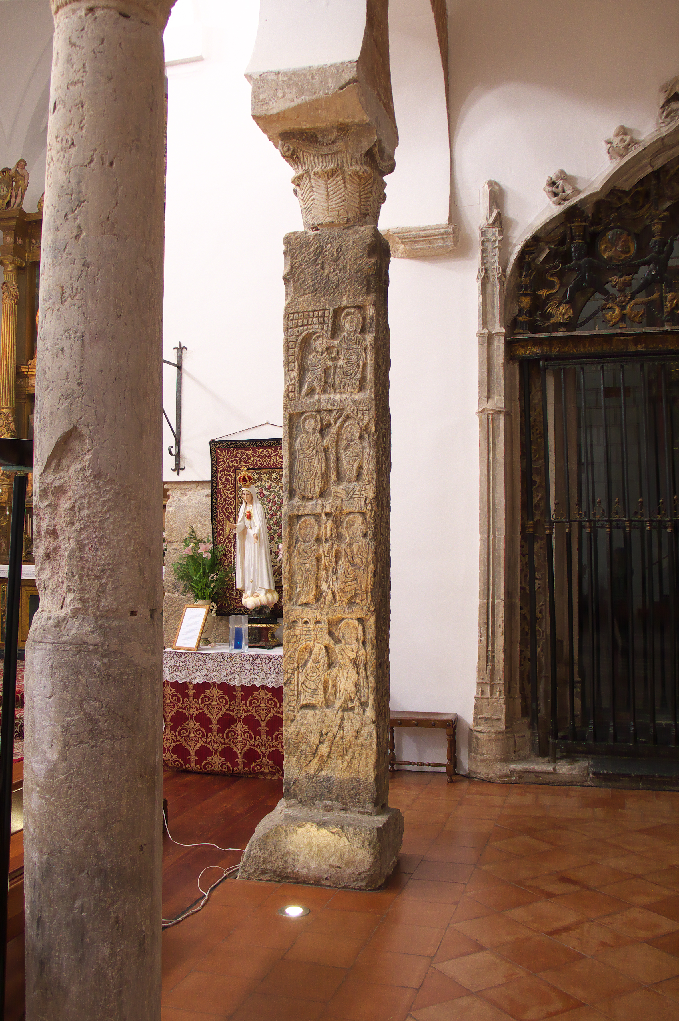 Existen datos de una mezquita (1040) sobre la que se edifica la iglesia toledana de El Salvador. Los musulmanes reutilizaron esta pilastra visigoda, de finales del VI o principios del VII, deteriorando su labrado por motivo obvio.